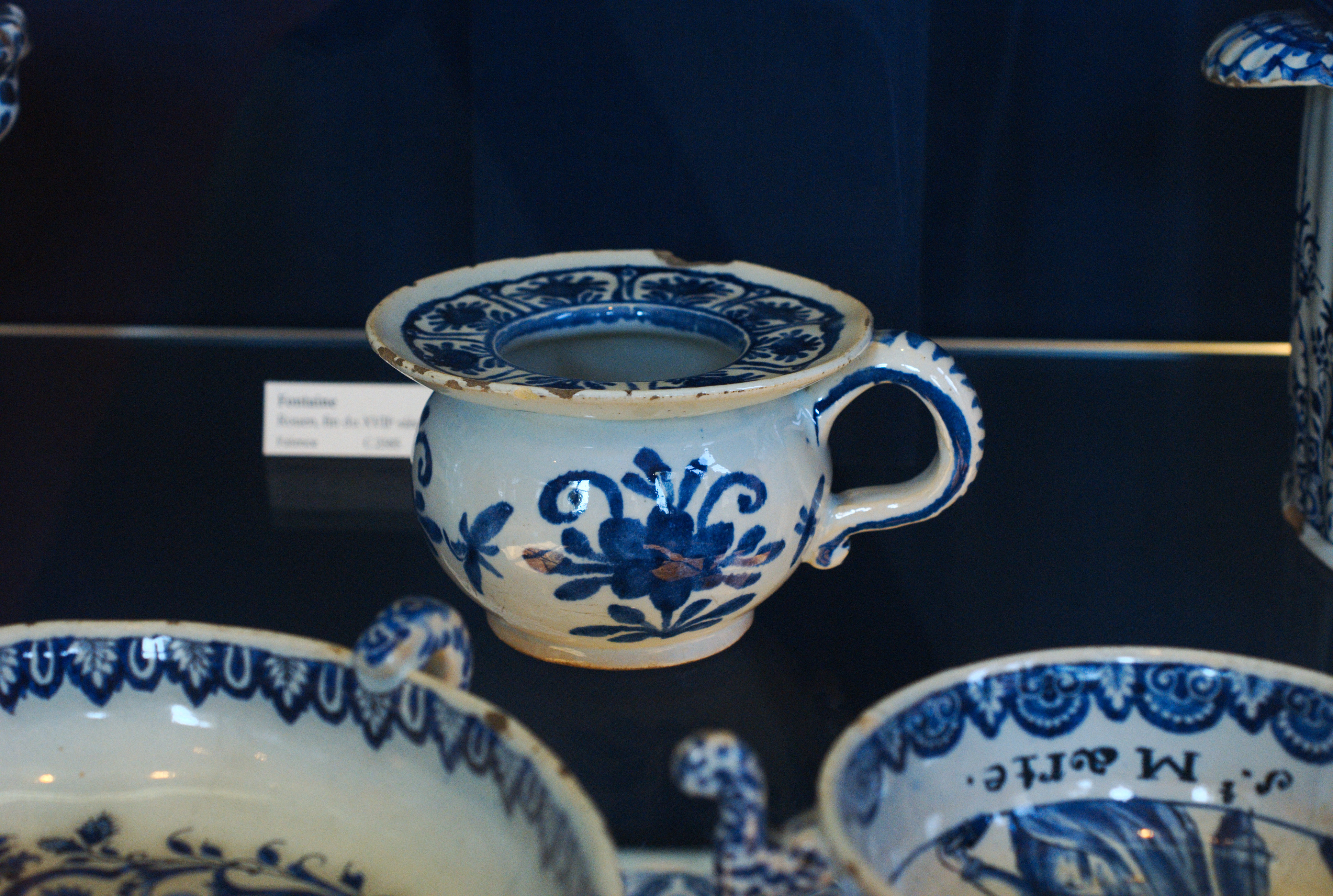 Crachoir en faïence fabriqué au début du 18e siècle à Rouen (Musée de la Céramique de Rouen)